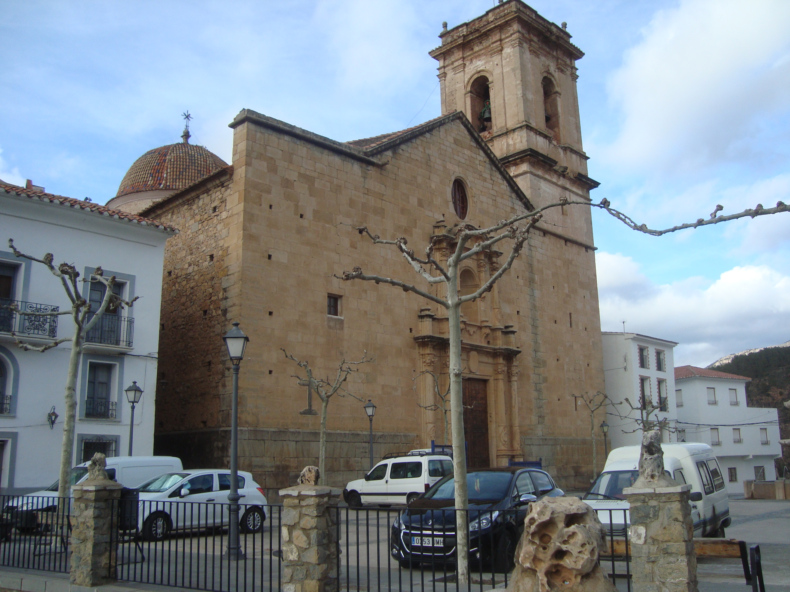 Església parroquial de la Nativitat de la Mare de Déu (Vilafermosa) 08.130-001.